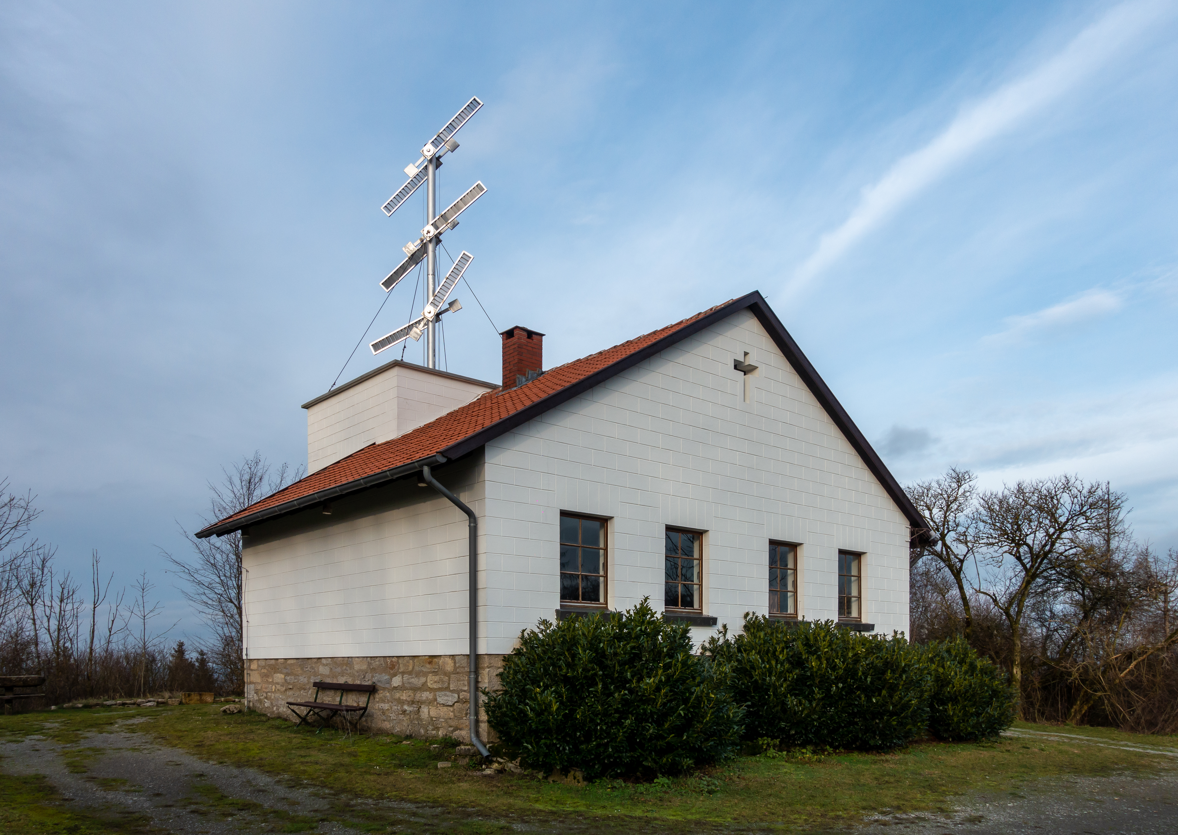 Nachbau der Station 32 des Preußischen optischen Telegraphen auf dem Bilsterberg in Nieheim-Oeynhausen